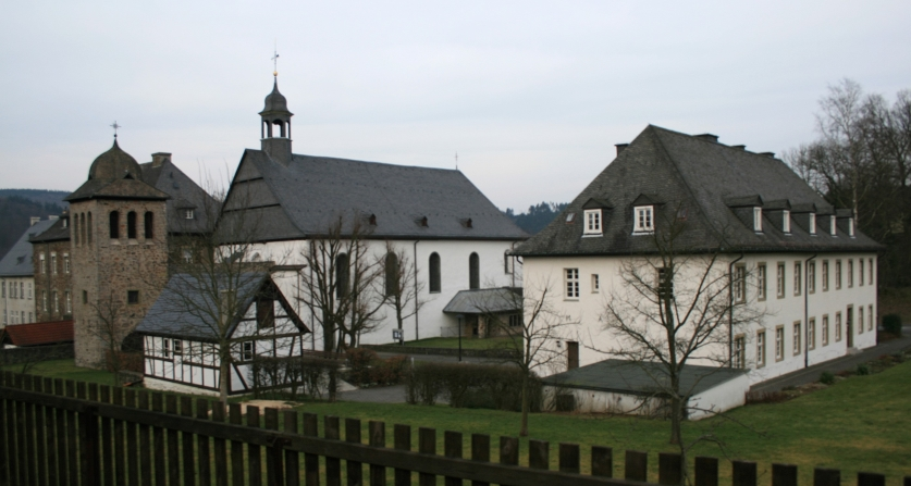 Ehemaliges Kloster Rumbeck in Arnsberg, Stadtteil Rumbeck.